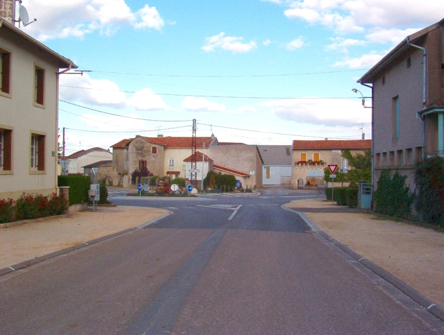 L'ancien château de Barisey-au-Plain vu de la rue St-Hubert (© Francis MONTIGNON) GFDL Francis MONTIGNON CatÃ©gorie:Image de commune de Meurthe-et-Moselle